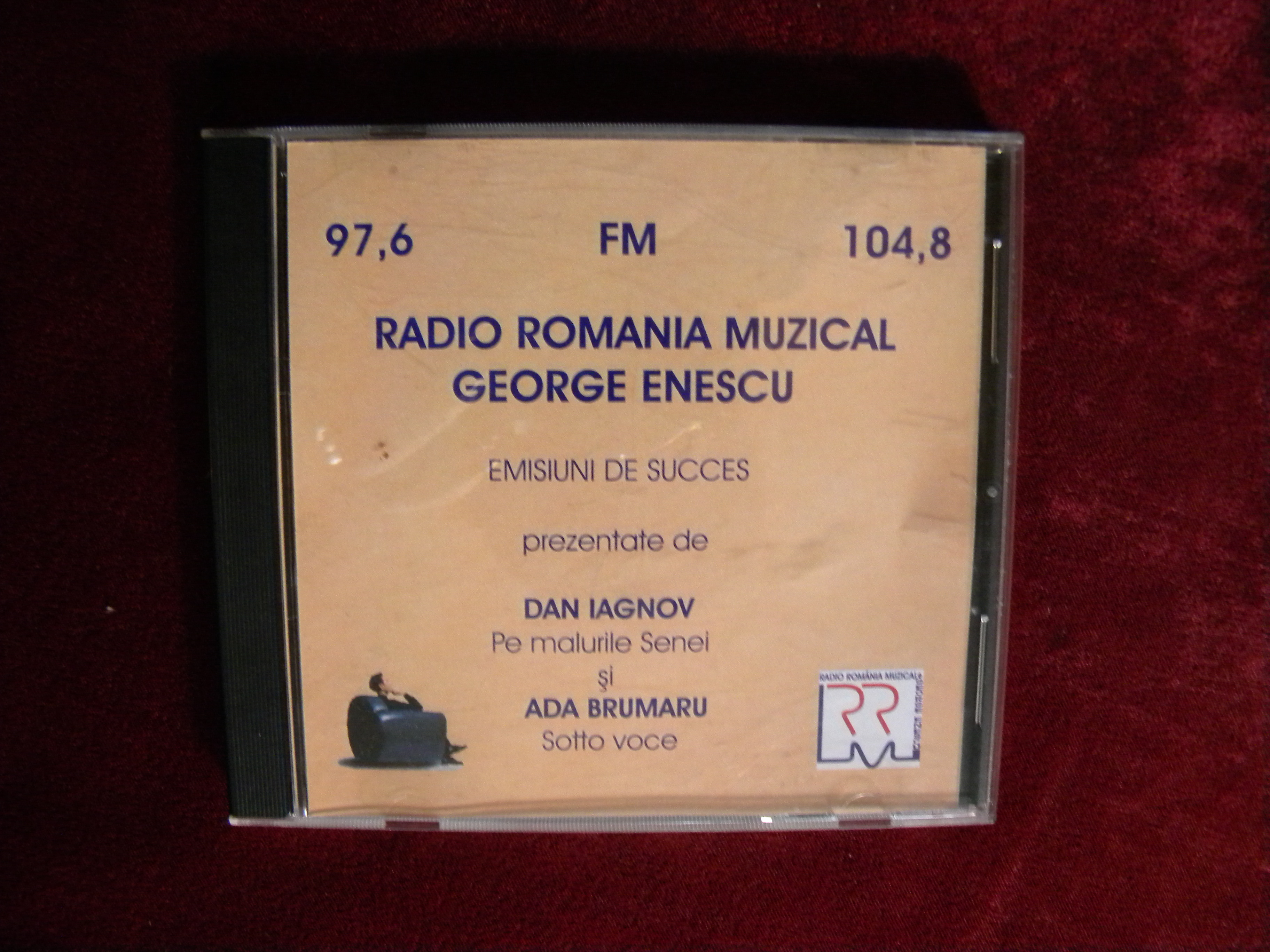 Imaginea CD-ului scos de RADIO ROMANIA MUZICAL cu una din emisiunile "Pe malurile Senei" de Dan Iagnov